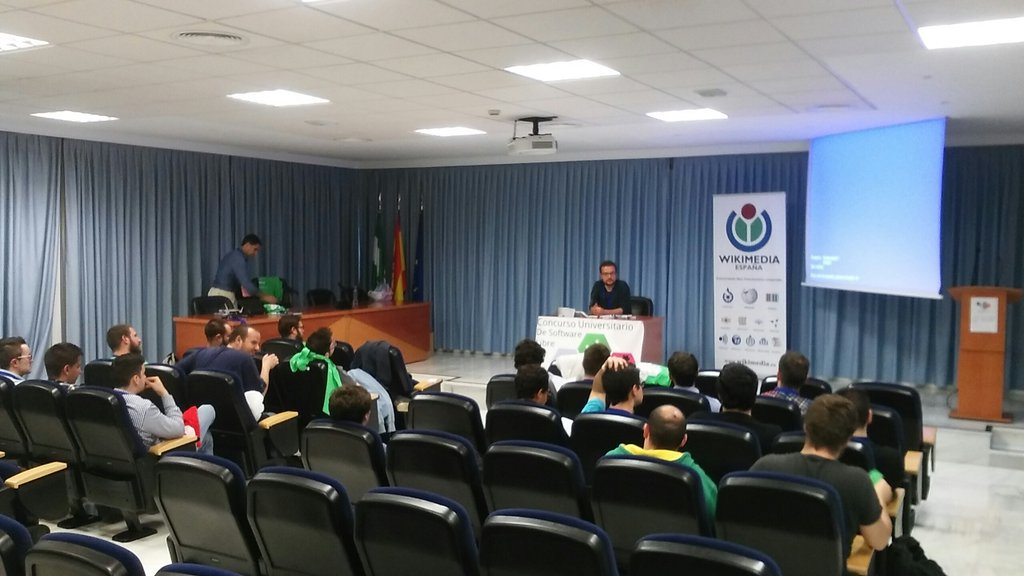 Discusión sobre 10 años del Concurso Universitario de Software Libre en la Universidad de Sevilla, organiza Pablo Neira